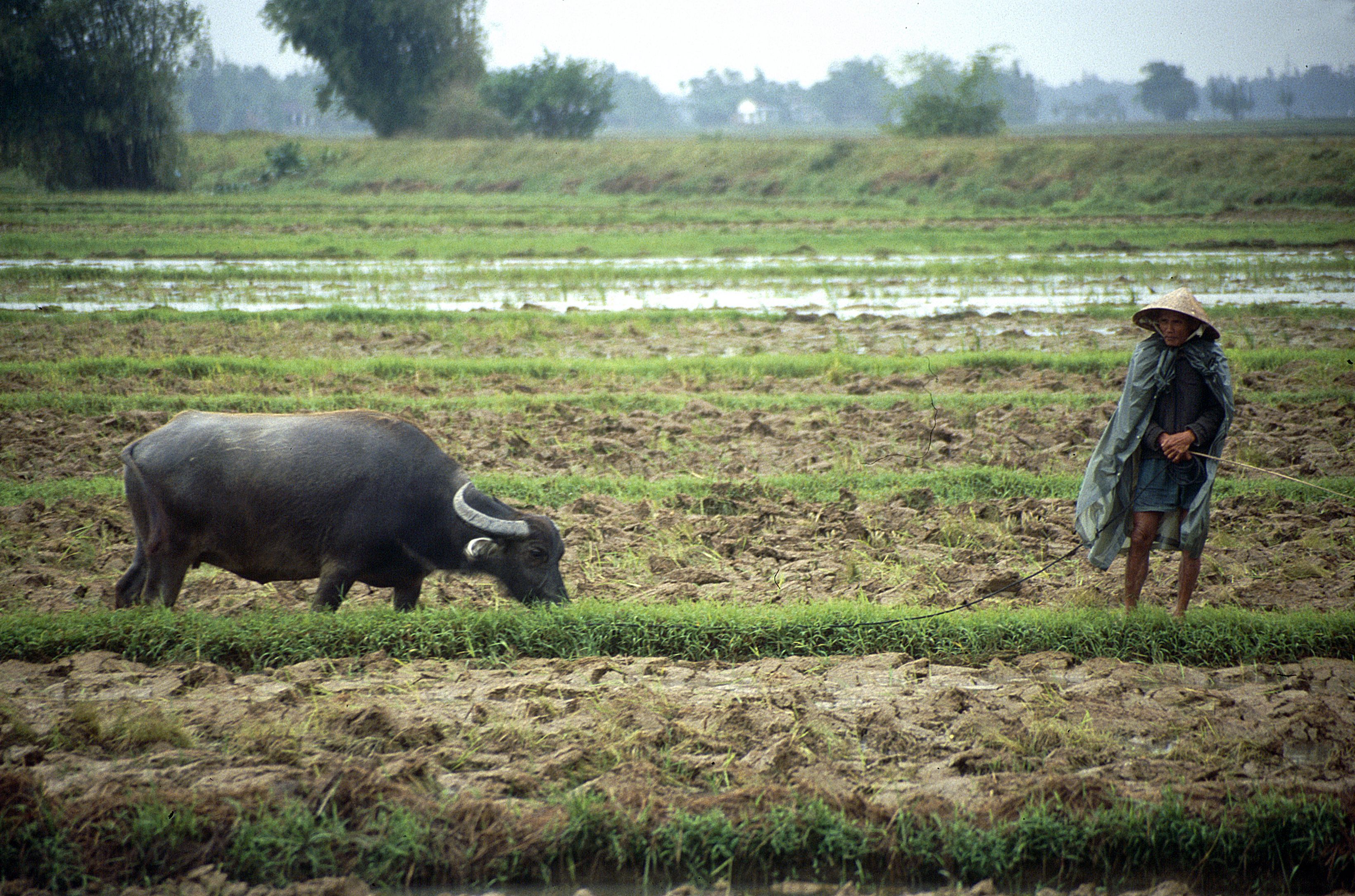 von Hoi An nach My Son